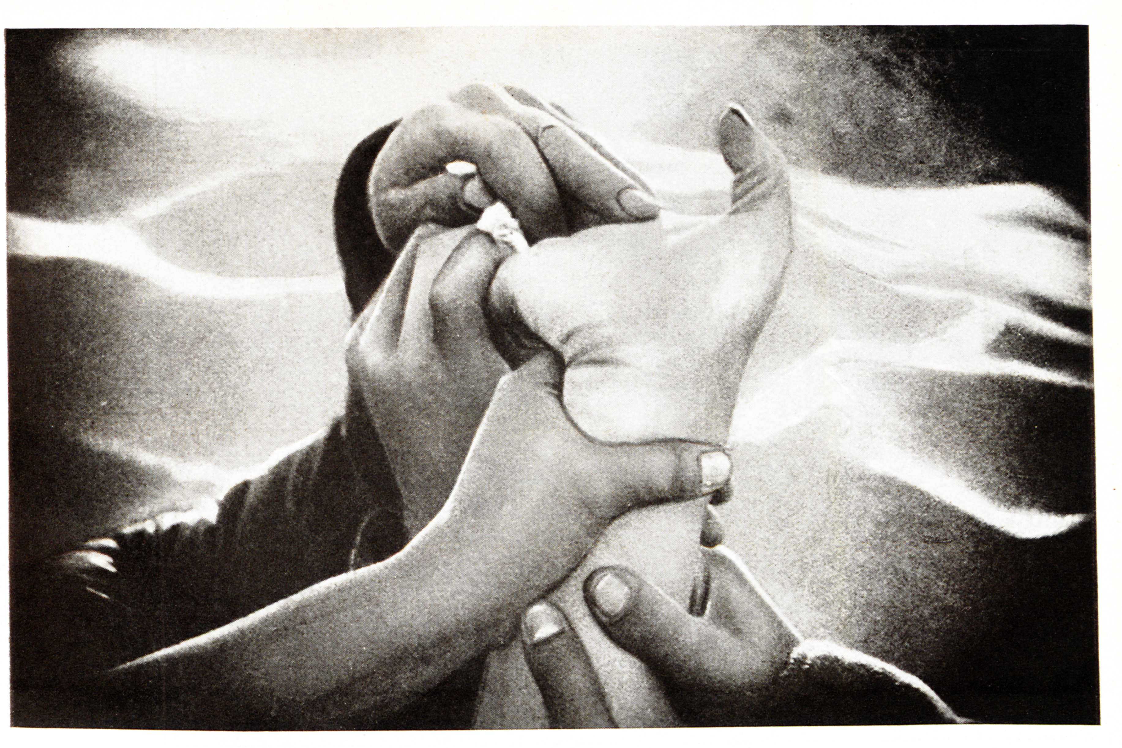 Jakow Alexandrowitsch Protasanow: Der Einundvierzigste (Сорок первый). Filmausschnitt 1927